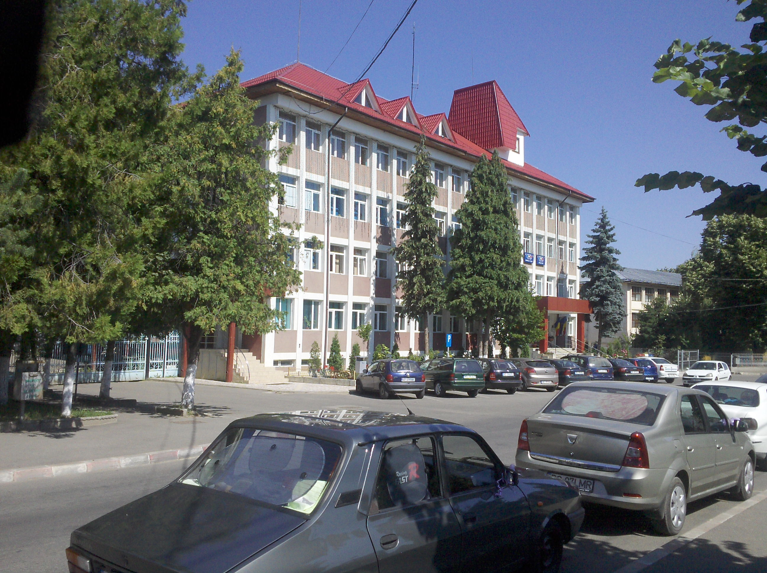 Ayuntamiento de Moineşti, Rumania.